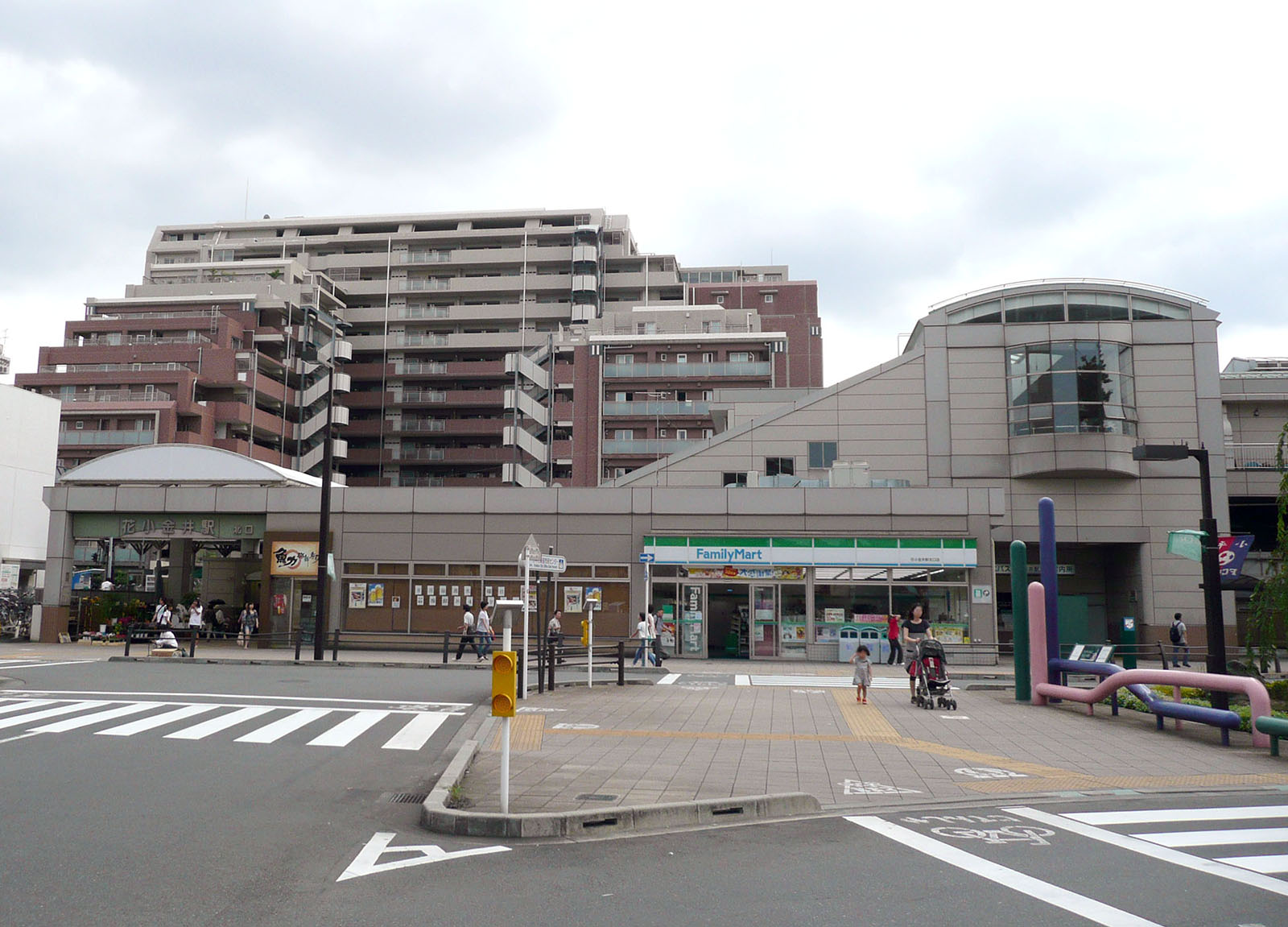 花小金井駅北口